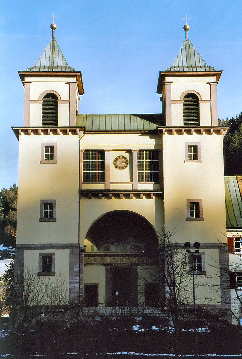 Die Bad Rippoldsauer Wallfahrts- und Pfarrkirche im Weinbrenner-Stil, erbaut 1829 durch Christoph Arnold. Eine der schönsten Kirchen des Klassizismus in Baden.